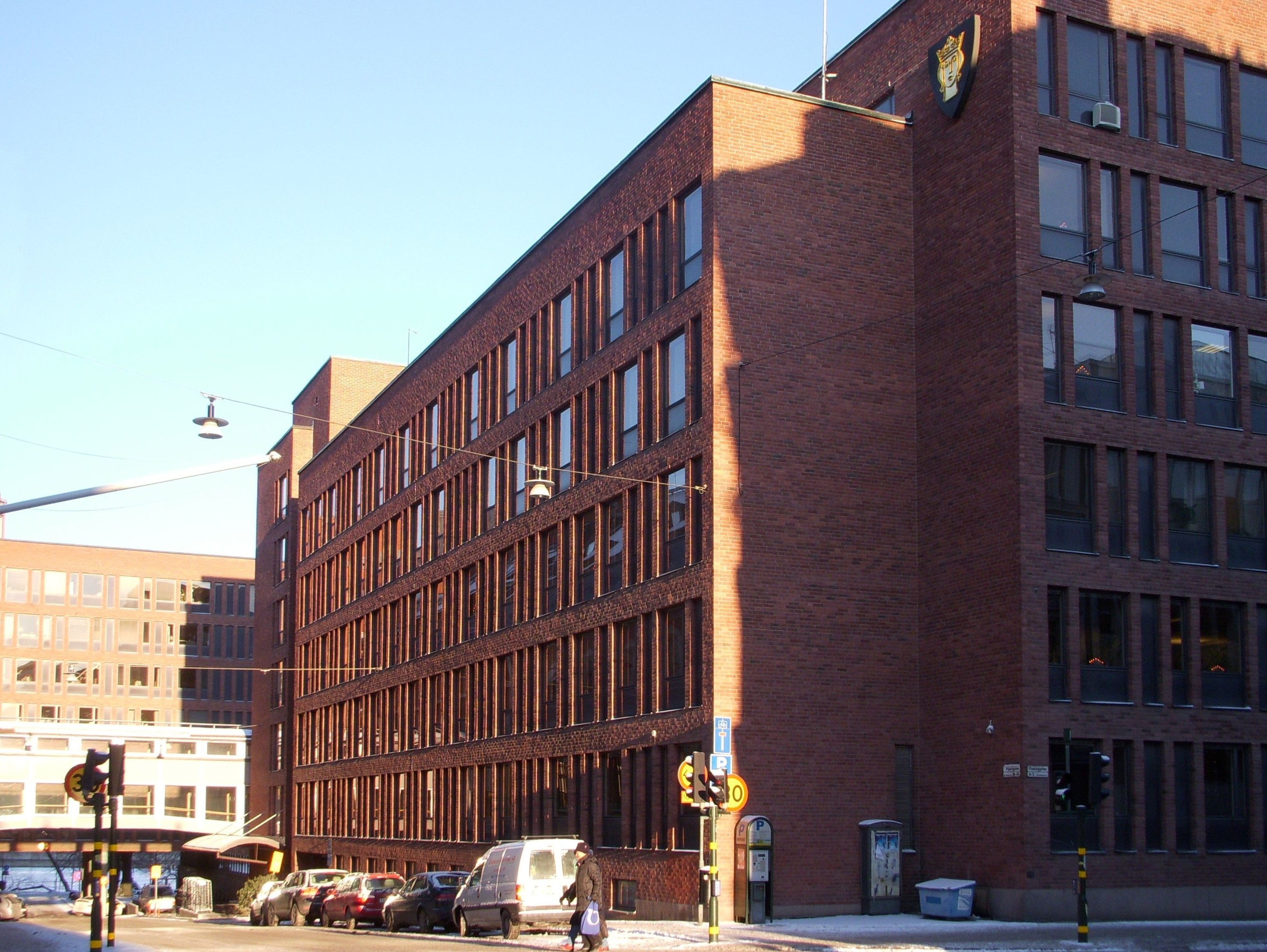 Tekniska nändhuset i Stockholm, från Fleminggatan